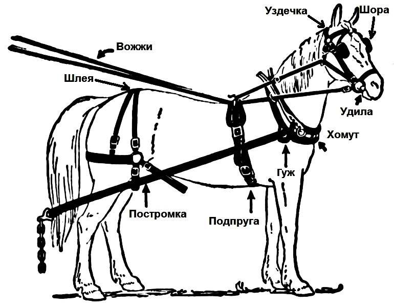 Иллюстрация конской упряжи.